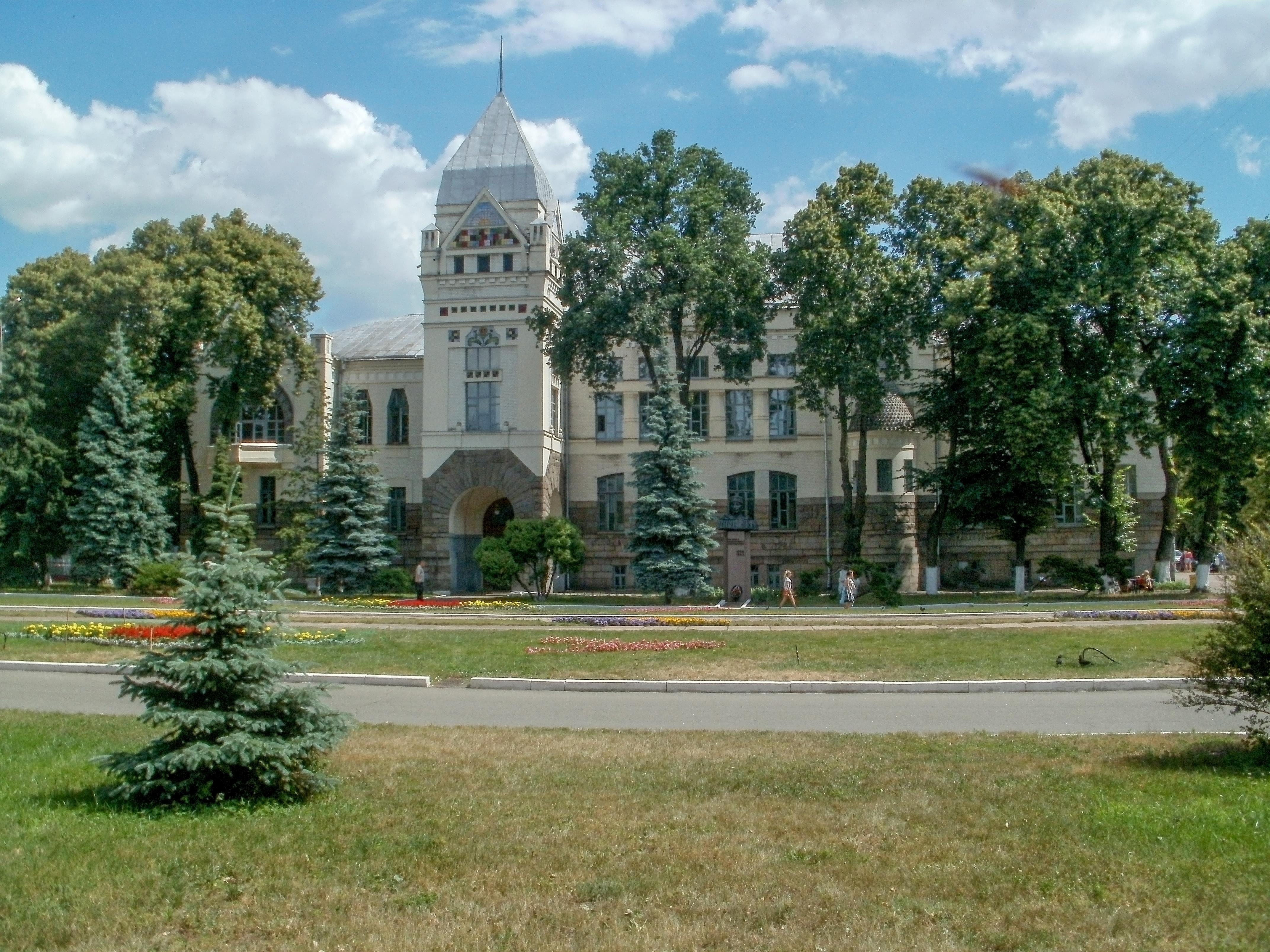 Будинок дворянського і селянського поземельного банку (мур.), Чернігів, пр-т. Миру, 41